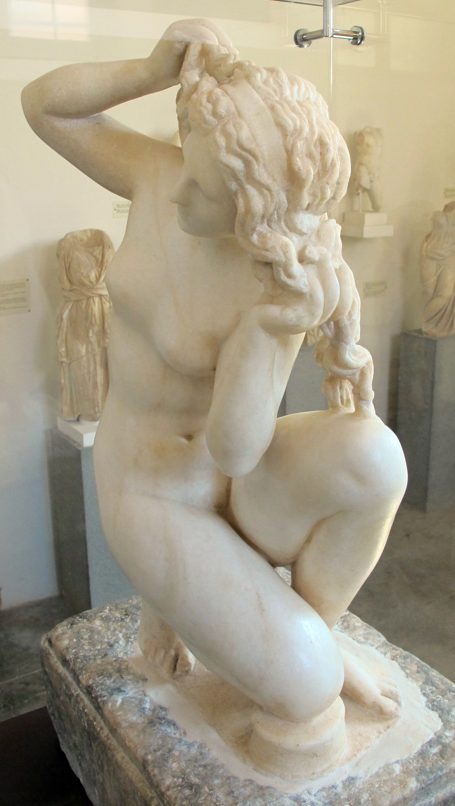 Statuetta di afrodite al bagno, rimodellamento da un originale di doidalsas, I sec. ac.